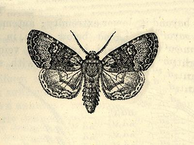 Cropia indigna